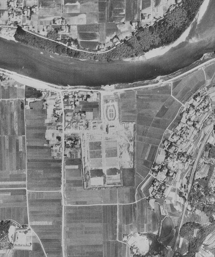 1945年に米軍が撮影した現広島市の戸坂浄水場